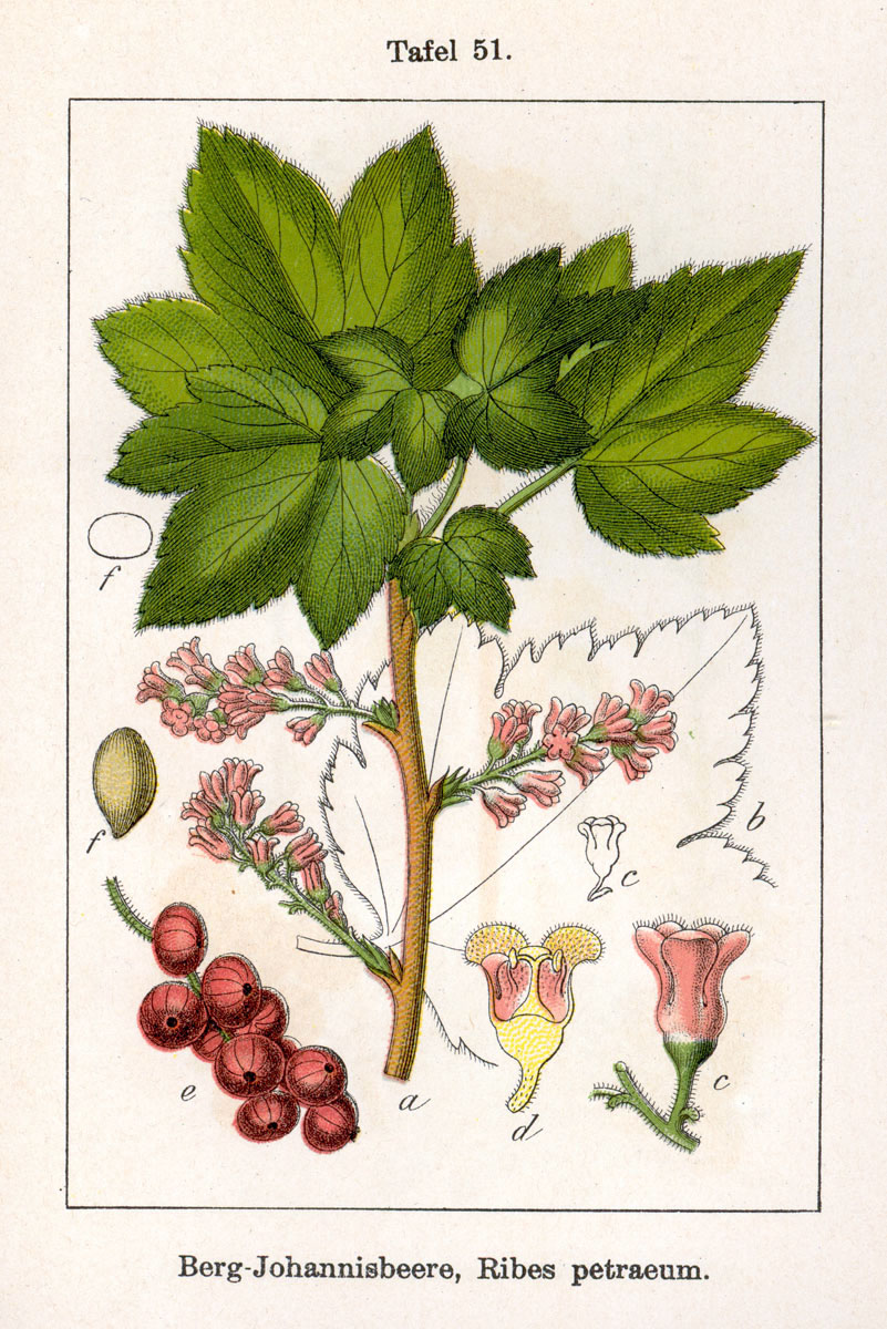 Ribes petraeum Wulfen Original Description Berg-Johannisbeere, Ribes petraeum